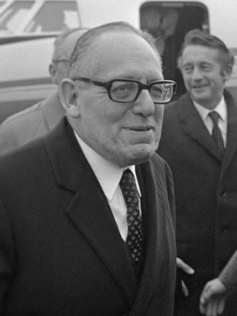 Maurice Schumann , minister van Buitenlandse Zaken van Frankrijk , arriveert op Ypenburg, verwelkomd door minister Luns . Links Schumann , rechts Luns 6 november 1969